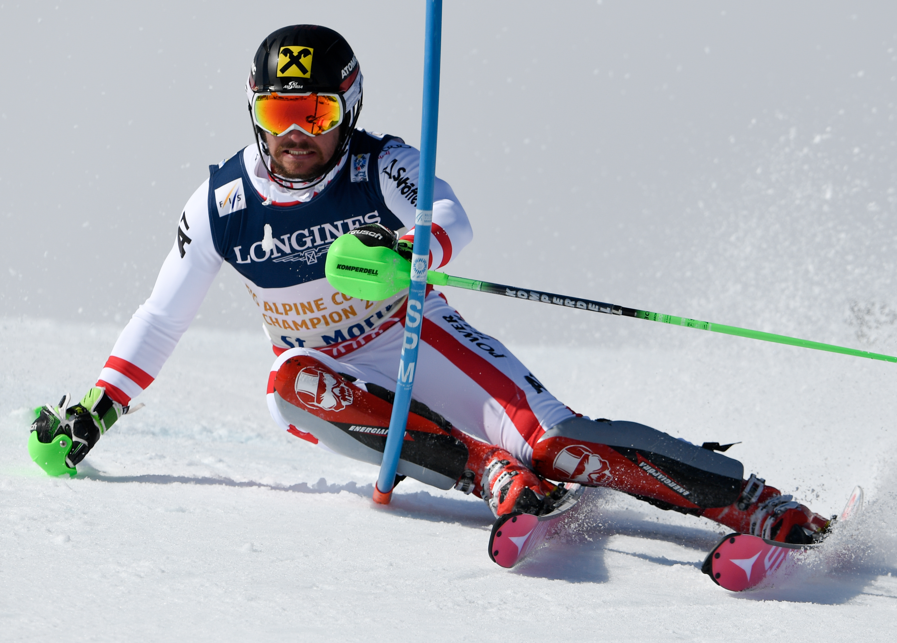 FIS alpine Ski world Championship St. Moritz,Kombinations-Slalom,man,Marcel Hirscher